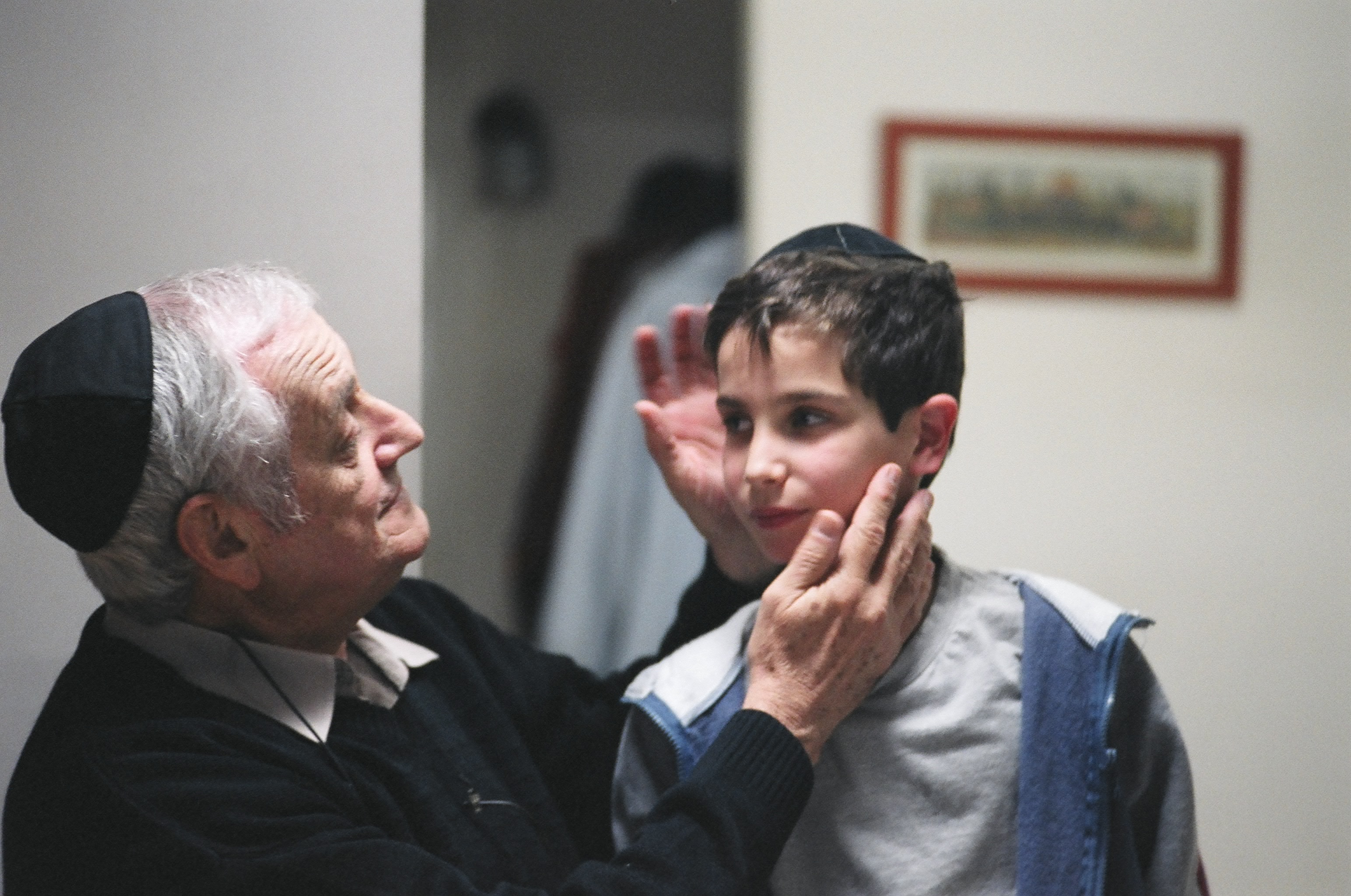 סרטו של רפאל נג'ארי "תהילים", 2007